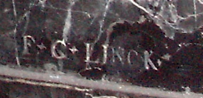 Franz Conrad Linck, eigene Signatur vom Epitaph Stengel, Mannheim, Sebastianskirche